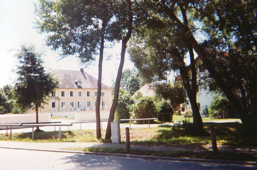 Der Pfarrhof von Schwindkirchen von Nordosten